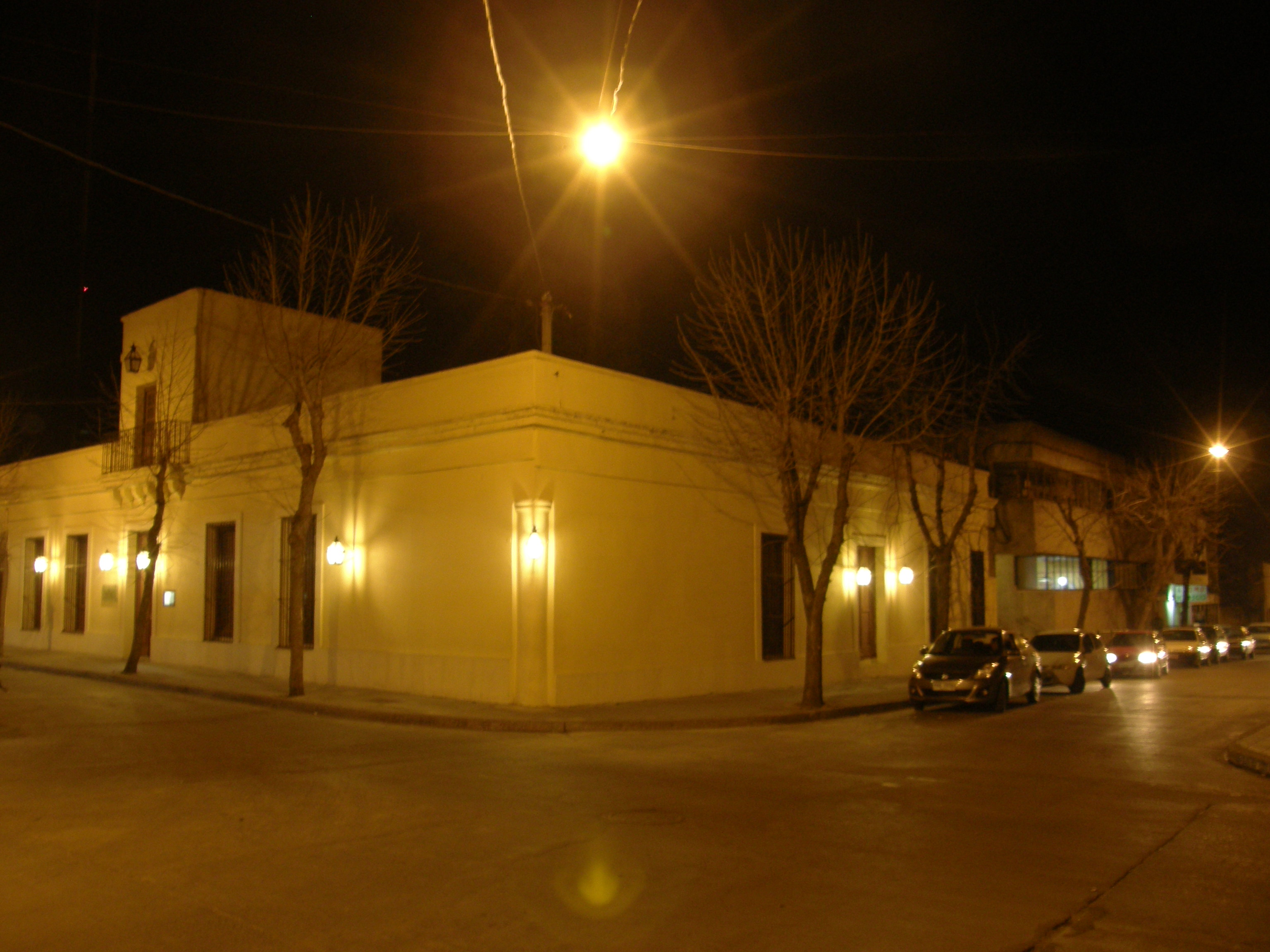 Vista nocturna de la fachada dle Museo Departamental, ubicado en la ciudad capital, San José de Mayo